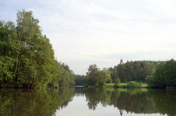 Odlezly Lake (Odlezelské jezero) in the Czech Republic.